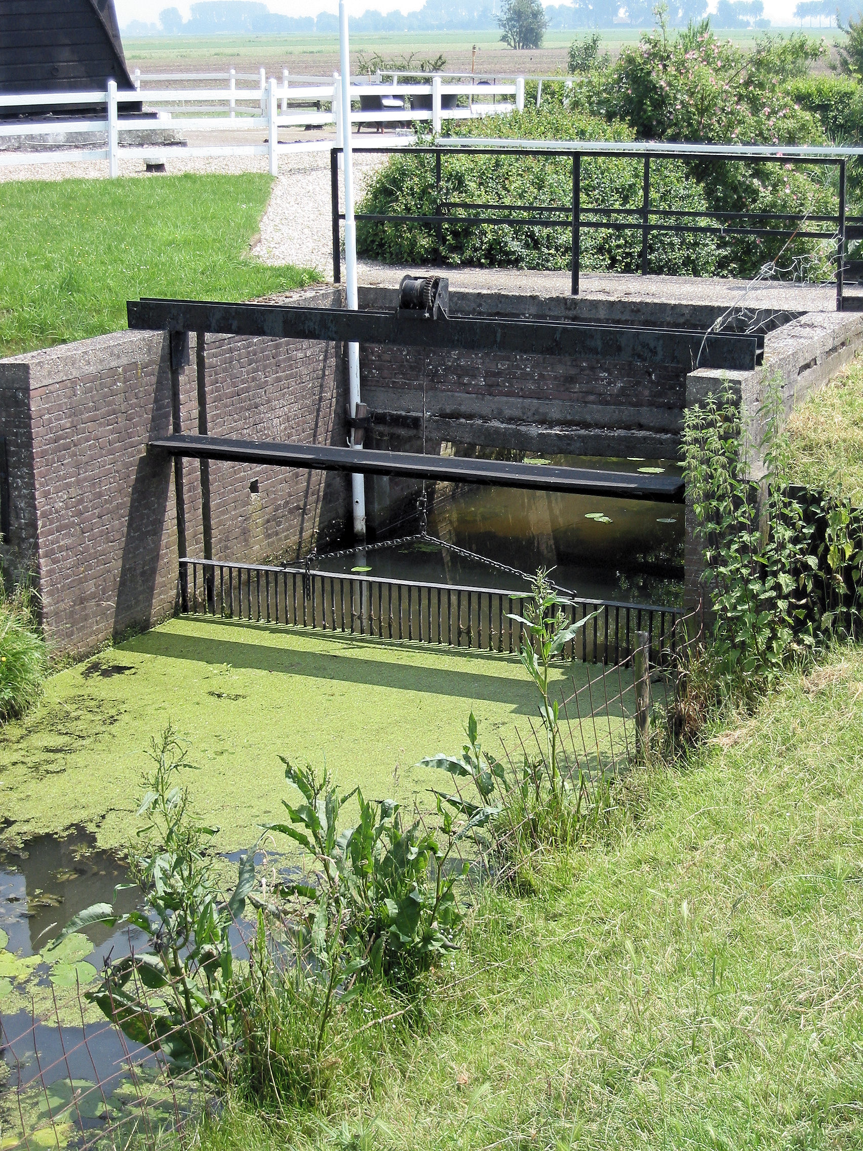 Krooshek, Wipmolen Laaglandse Molen in Hellouw, Gelderland, the Netherlands